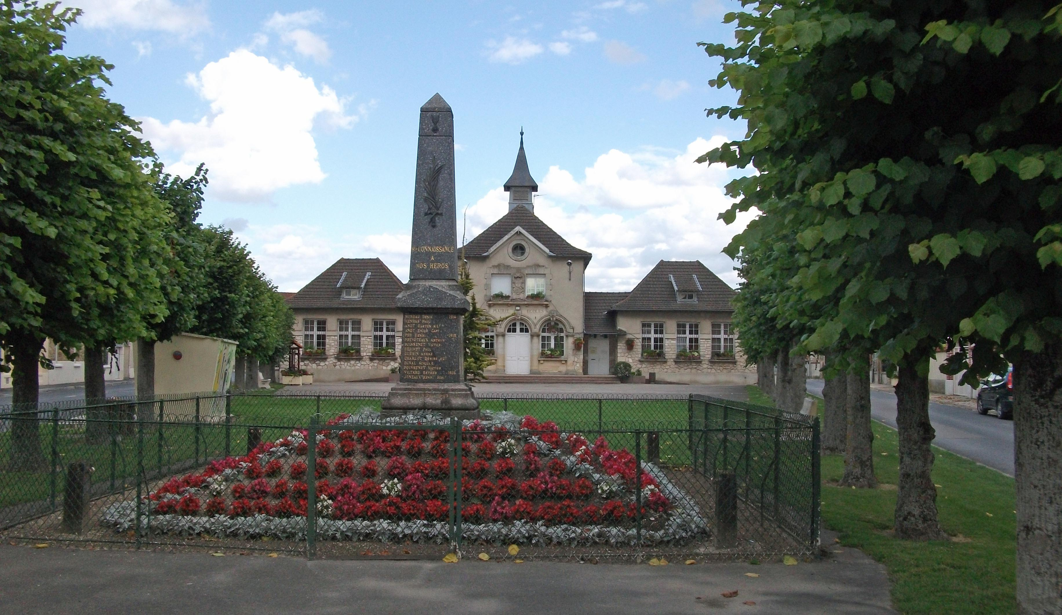 la Mairie l'école et au premier plan le monument aux morts de Prunay .